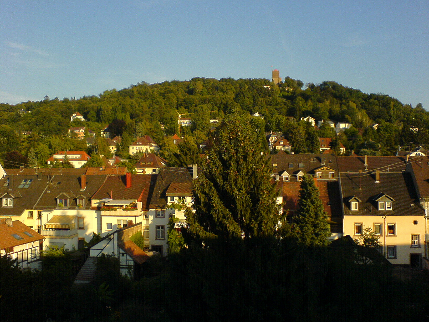 Turmberg in Durlach